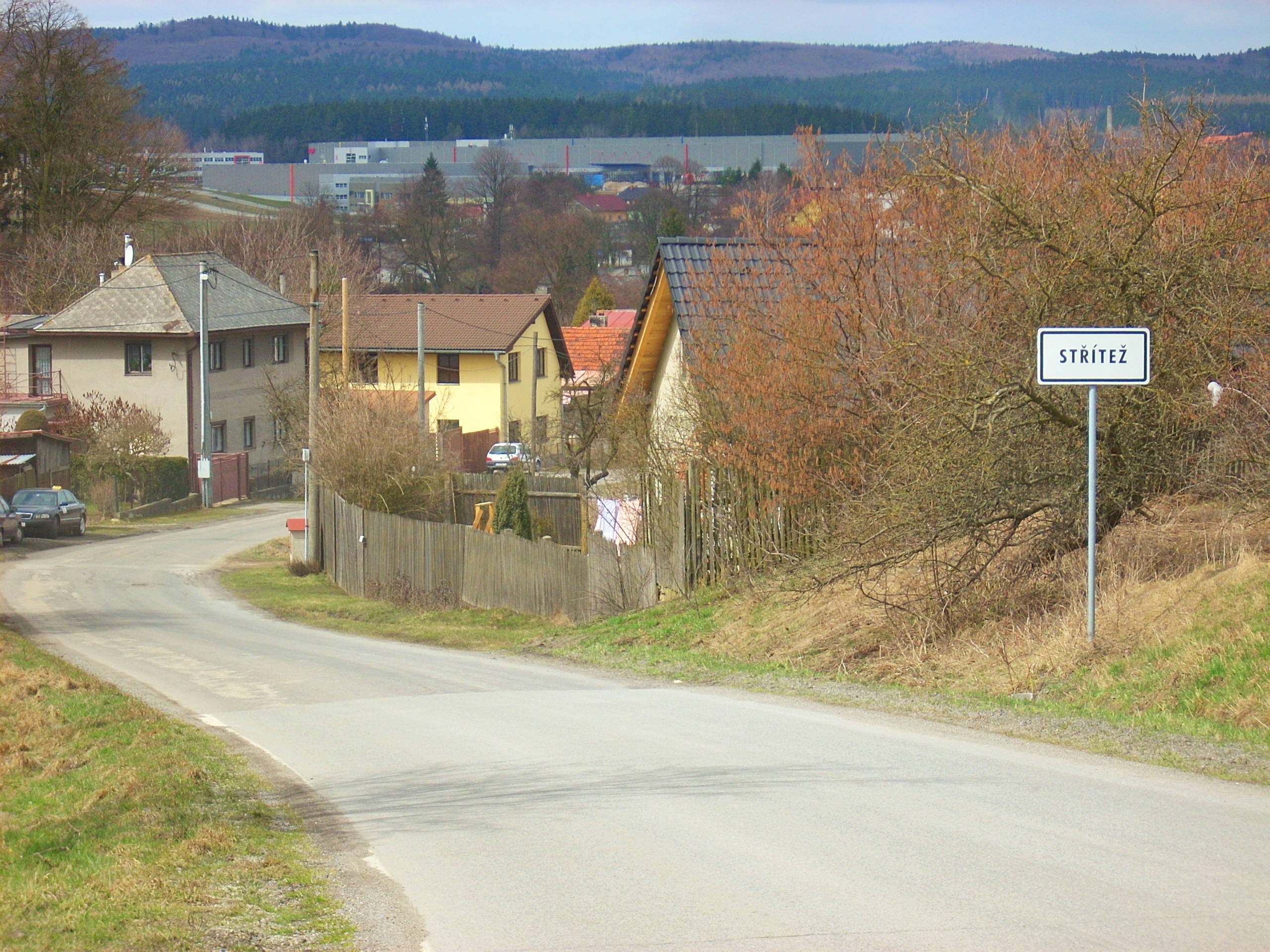 vjezd směr od Ždírce, Střítež, okres Jihlava